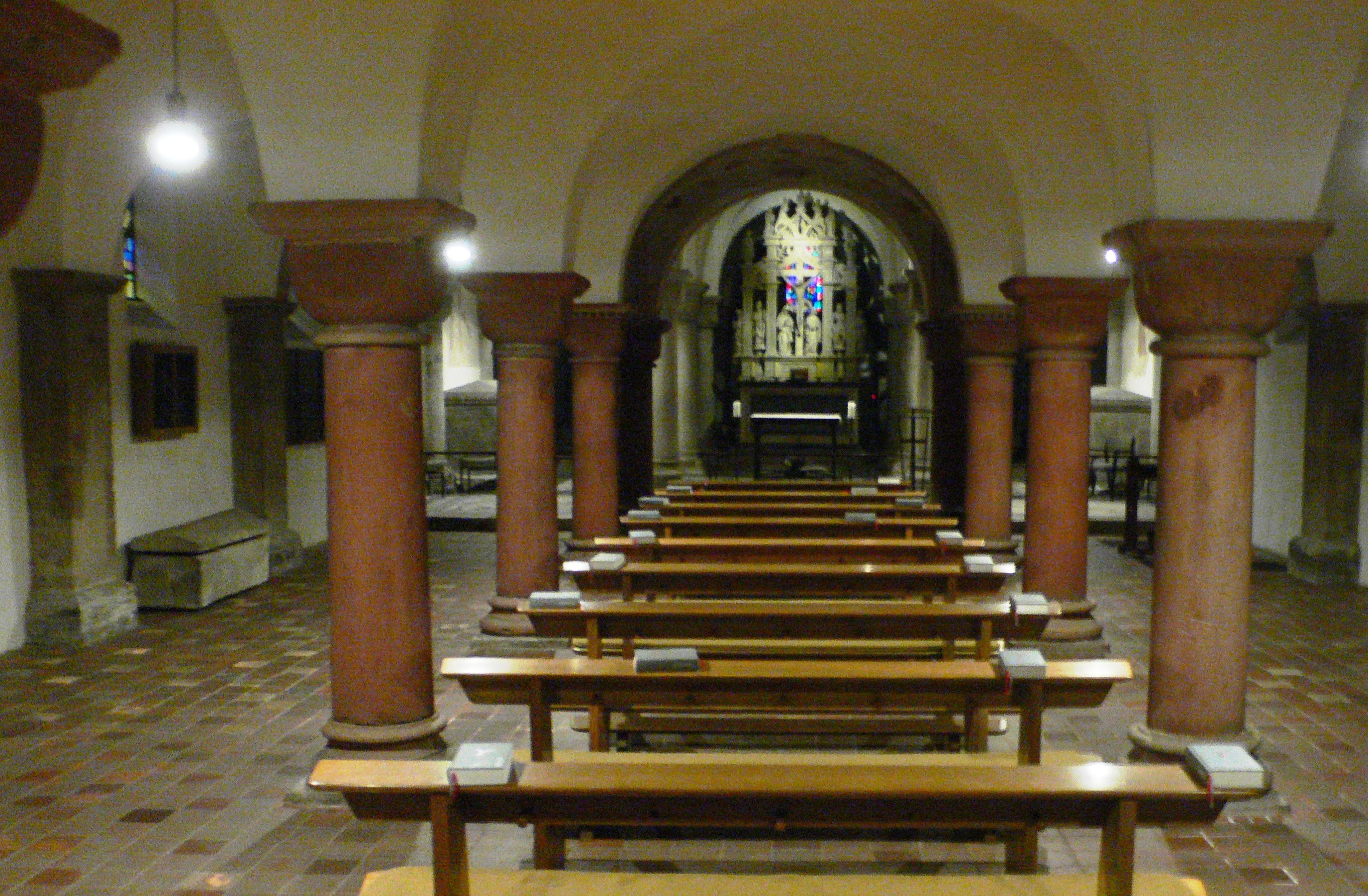 Krypta von St. Gereon